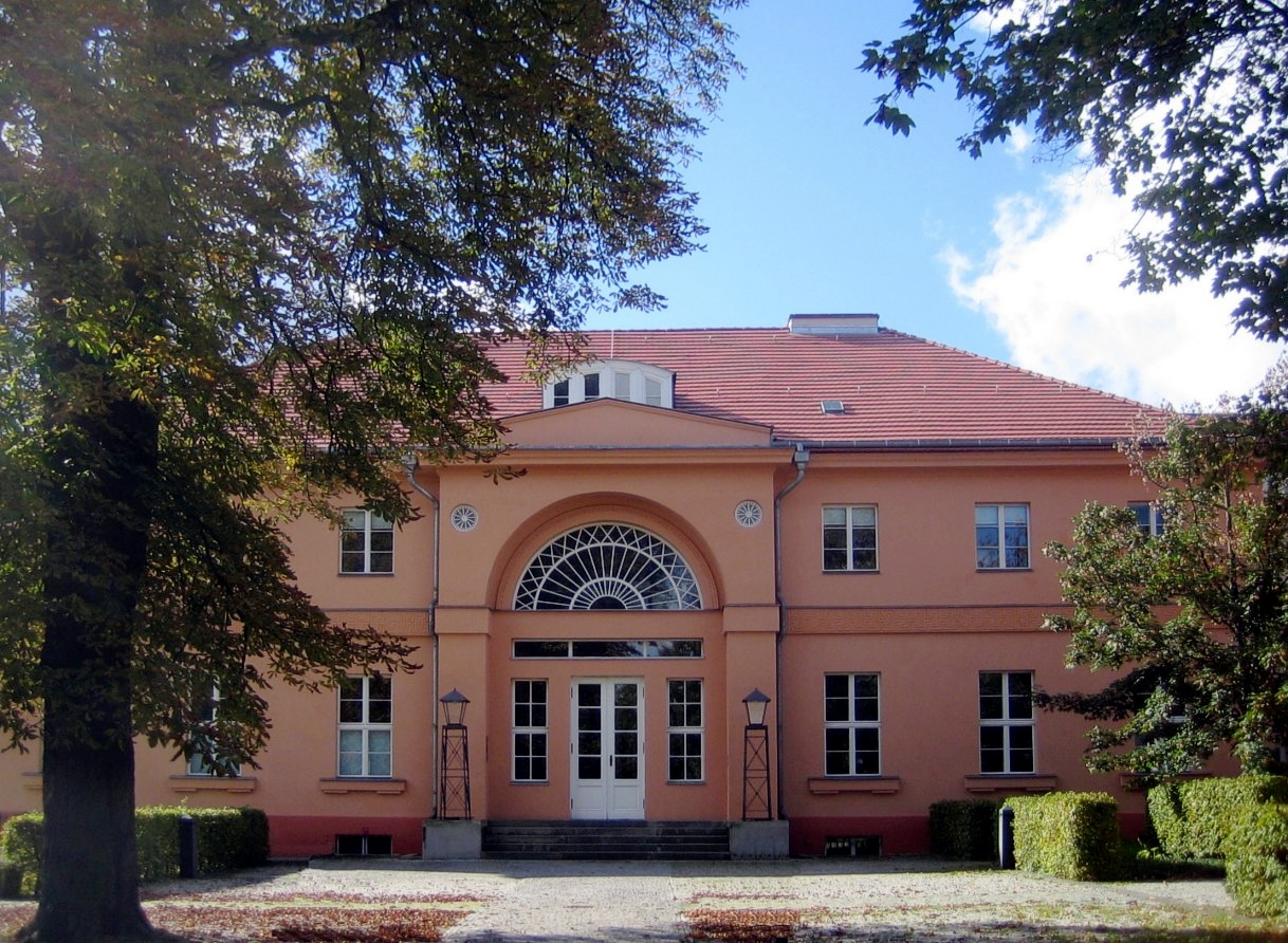 Gutshaus Steglitz, das sogenannte "Wrangelschlösschen" im Berliner Bezirk Steglitz-Zehlendorf.